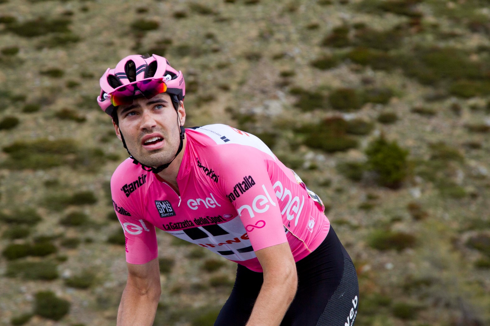 051 dumoulin